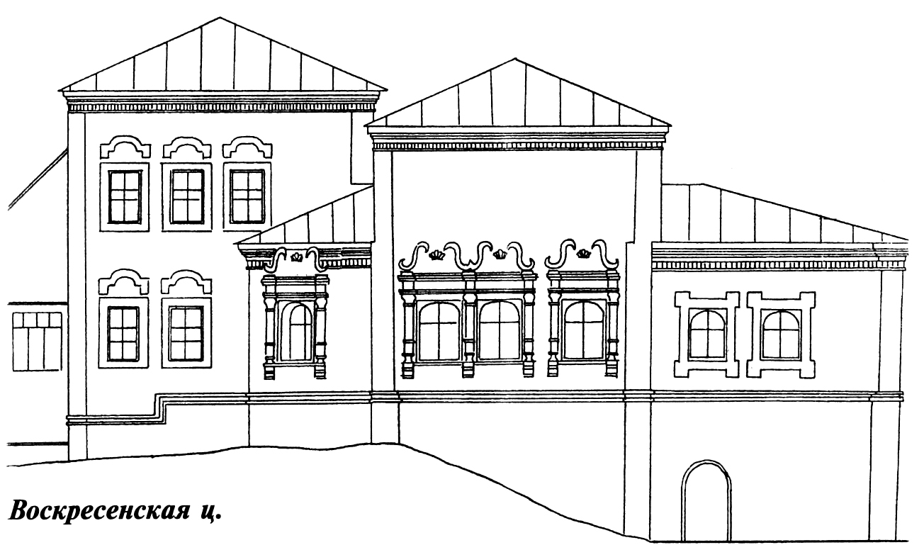 Воскресенская церковь до перестройки. Чертёж. Город Соликамск